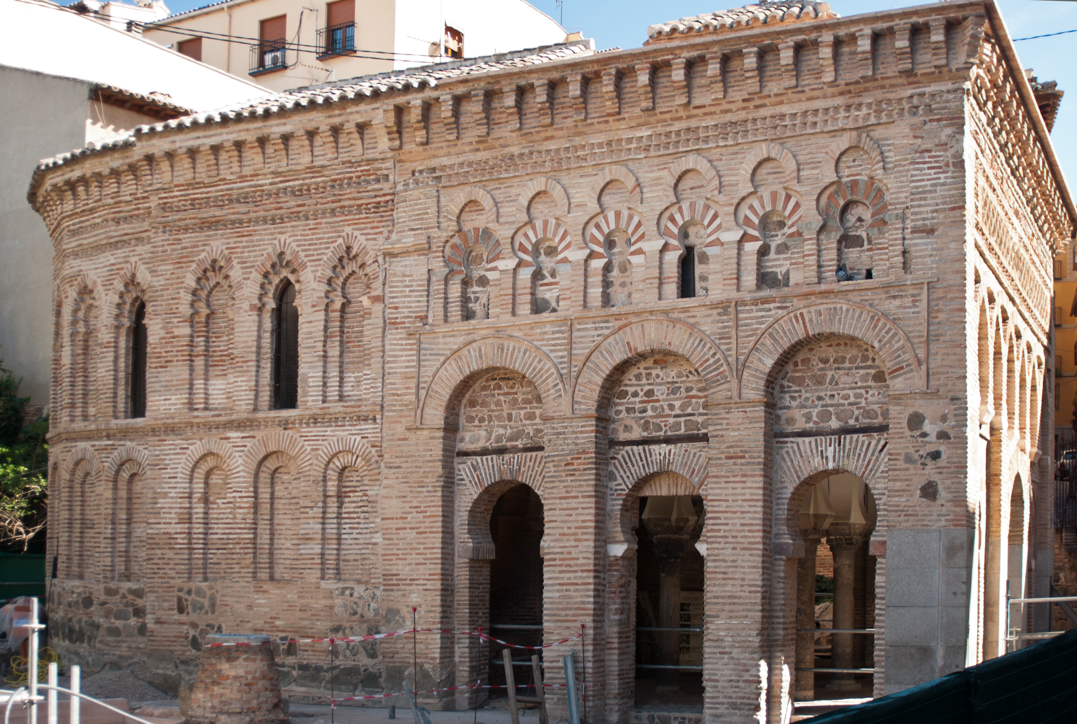 Mezquita Cristo de la Luz de Toledo